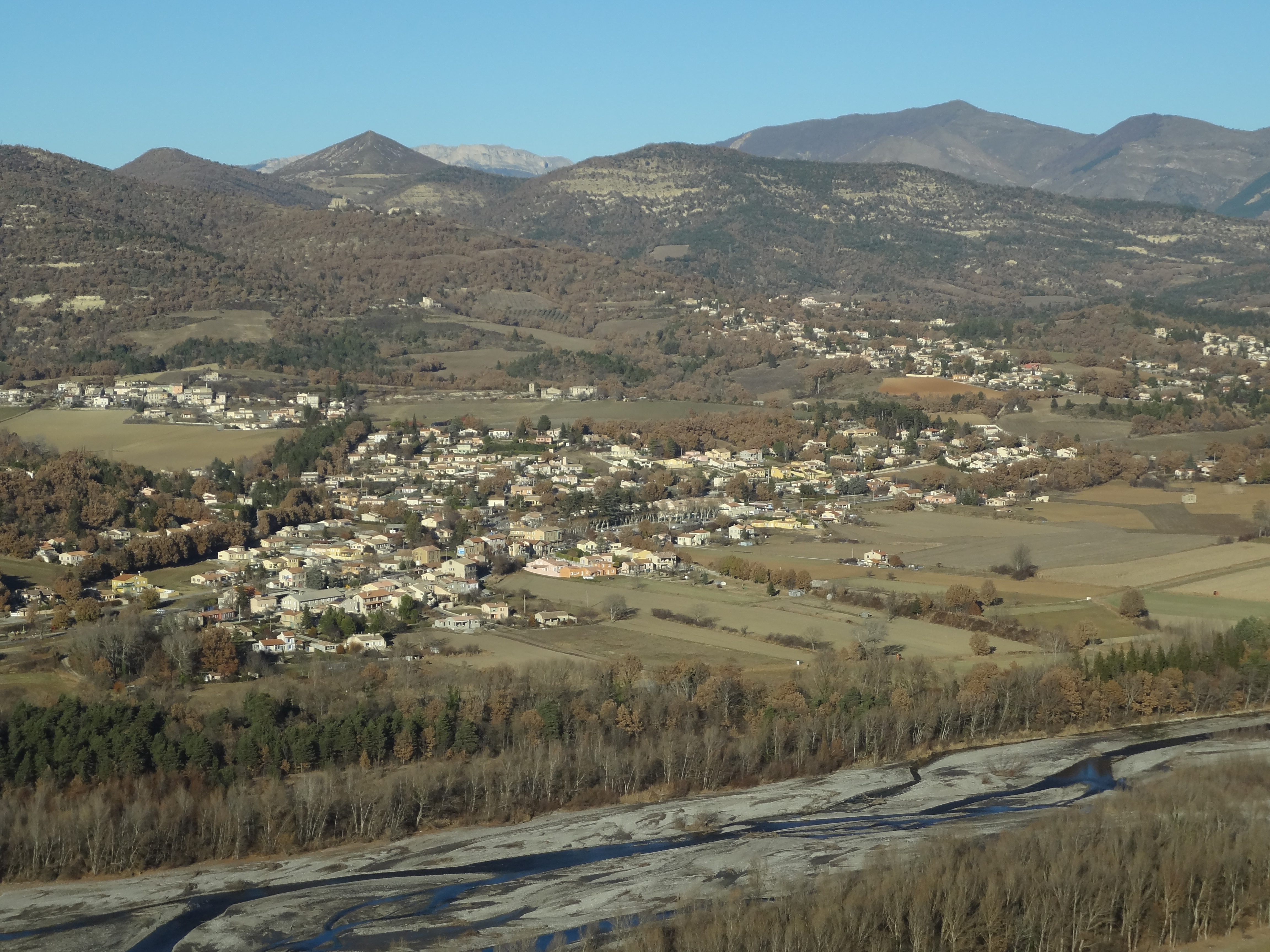 Vallée de la Bléone, village de Mallemoisson et en fond, pic d'Oise (montagne pyramidale de la commune de Champtercier).